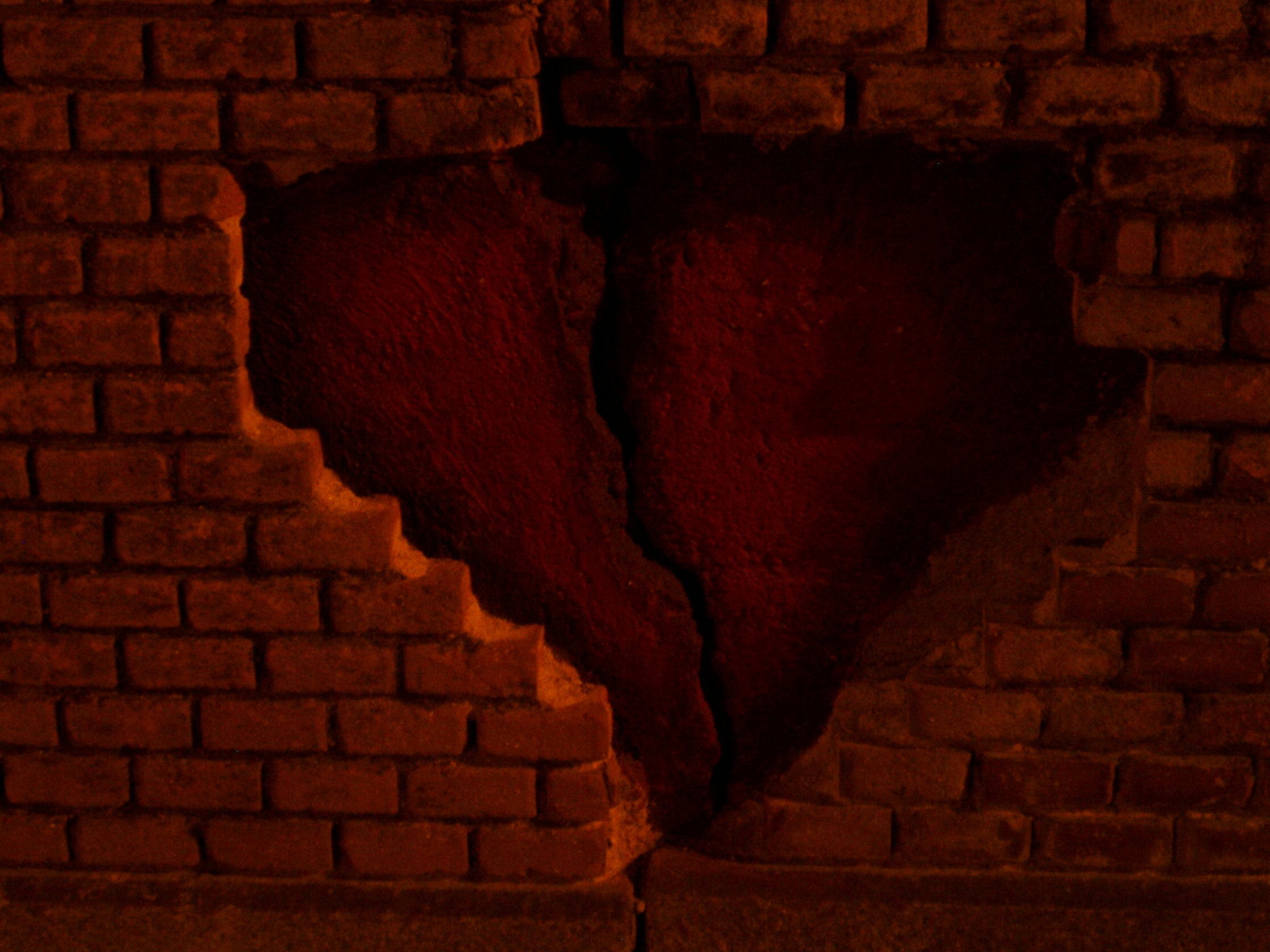 Flickr: Intercambio de fotos. Flickr. Recuperado 6 de abril de 2014, a partir de